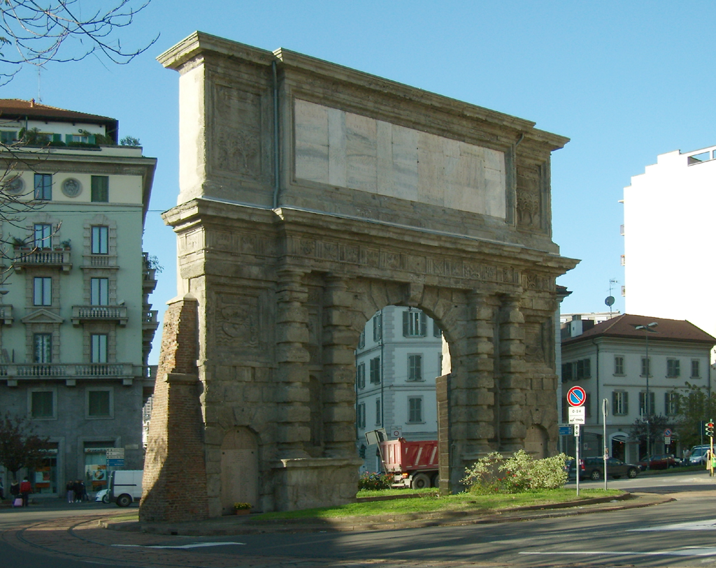 L'arco di Porta Romana in piazza Medaglie d'Oro a Milano